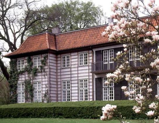 Ordrupgaard